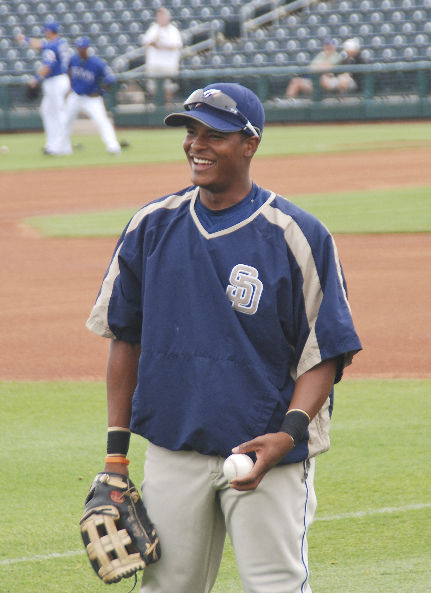 Cedric Hunter